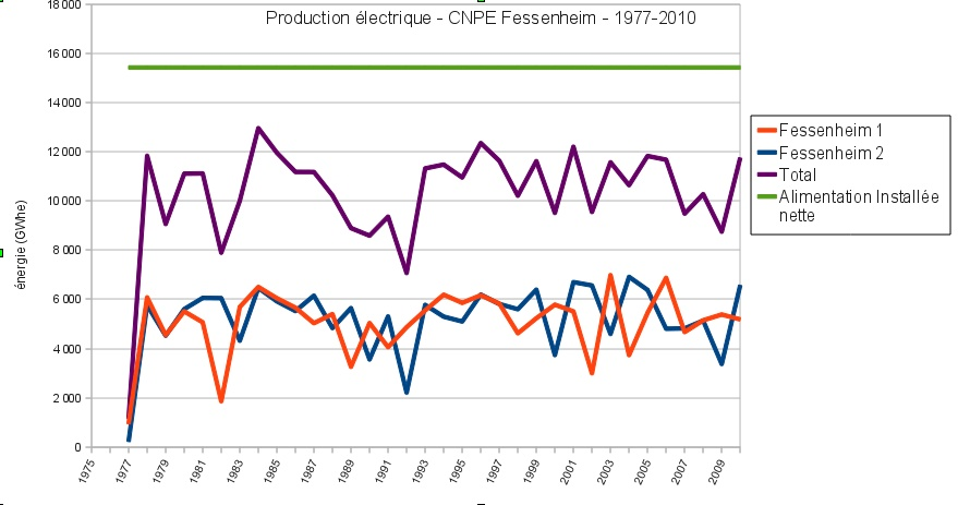 traduction de File:Stromproduktion AKW Fessenheim 1977-2010.gif Sources : réacteur I: International Atomic Energy Agency: Fessenheim-1, réacteur II: : International Atomic Energy Agency: Fessenheim-2